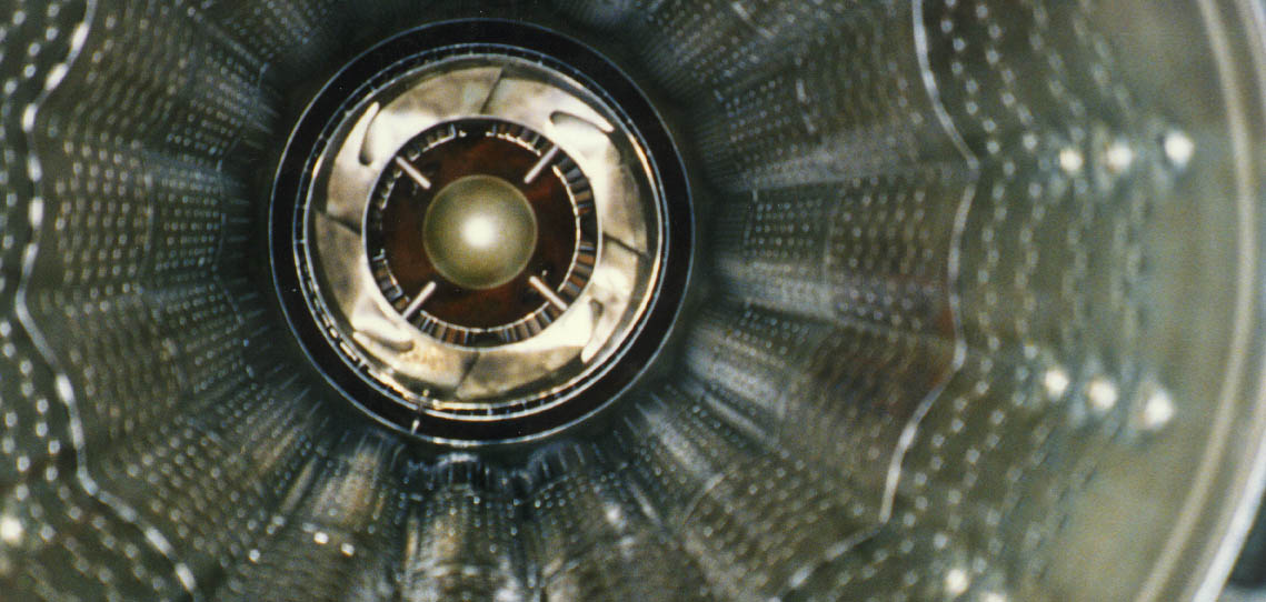 F-5 nachbrenner